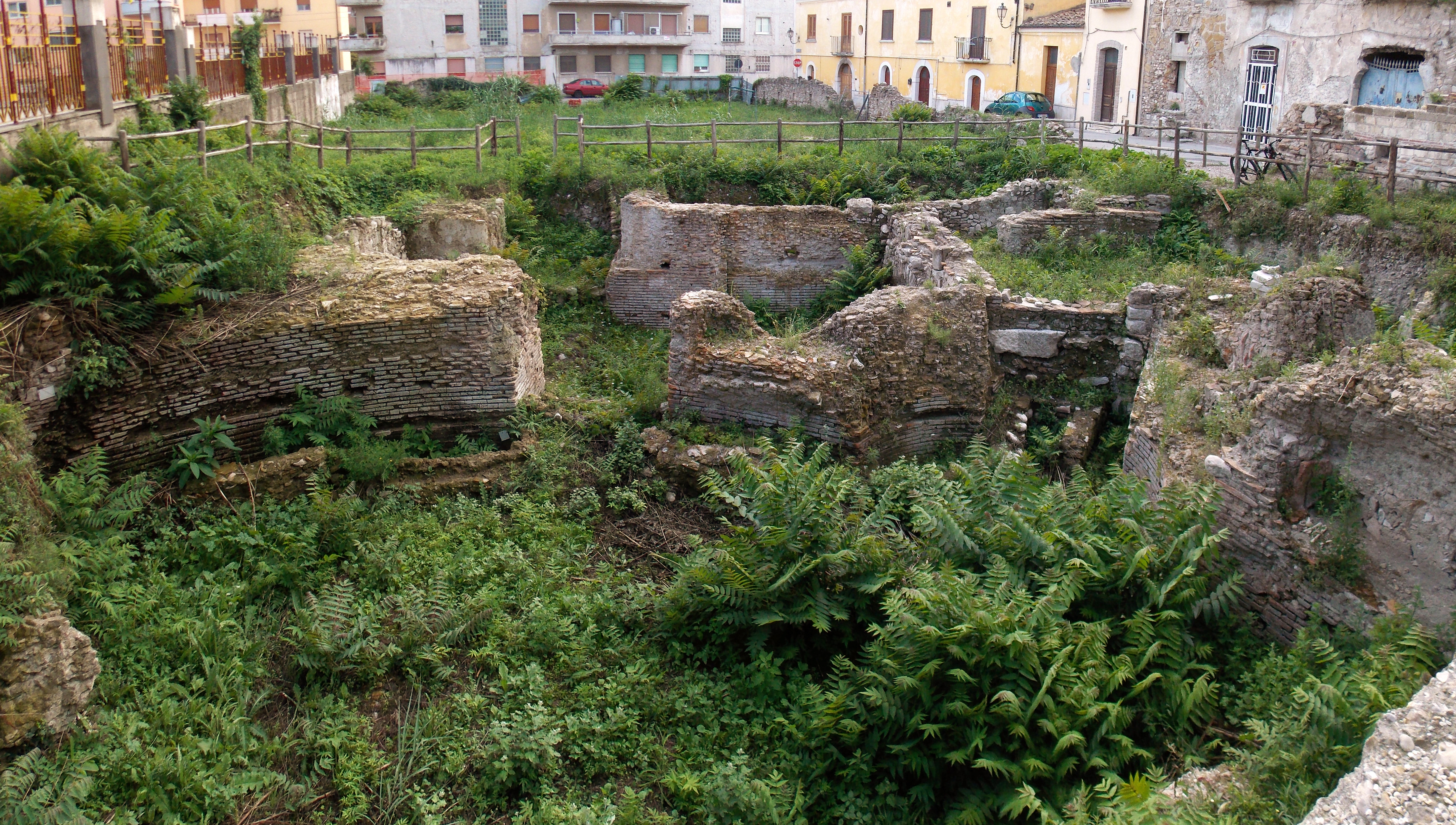 I resti delle terme romane di San Cristiano (II sec. d.C.) nel rione Triggio a Benevento: scavi di casa Campi